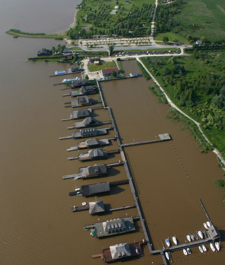 Fertőrákosi vízitelep (Győr-Moson-Sopron megye)